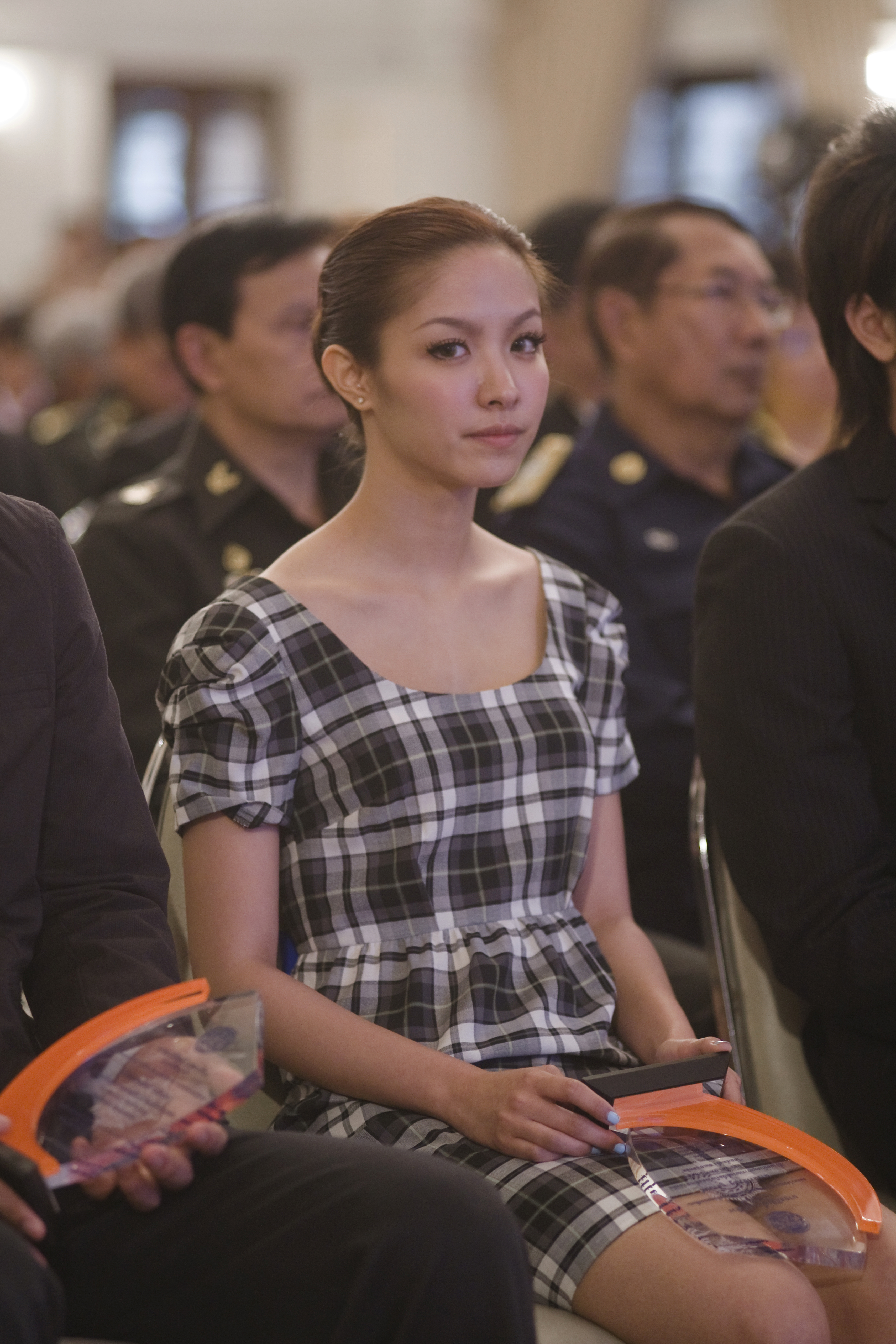 นายกรัฐมนตรี เป็นประธานพิธีมอบโล่ "ประกาศเกียรติคุณบุคคลและองค์กรที่มีผลงานยอดเยี่ยมและดีเด่นในการป้องกันและแก้ไขปัญหายาเสพติด ประจำปี 2553" ณ ตึกสันติไมตรี ทำเนียบรัฐบาล วันที่ 25 มิถุนายน 2553 (The Official Site of The Prime Minister of Thailand Photo by พีรพัฒน์ วิมลรังครัตน์)